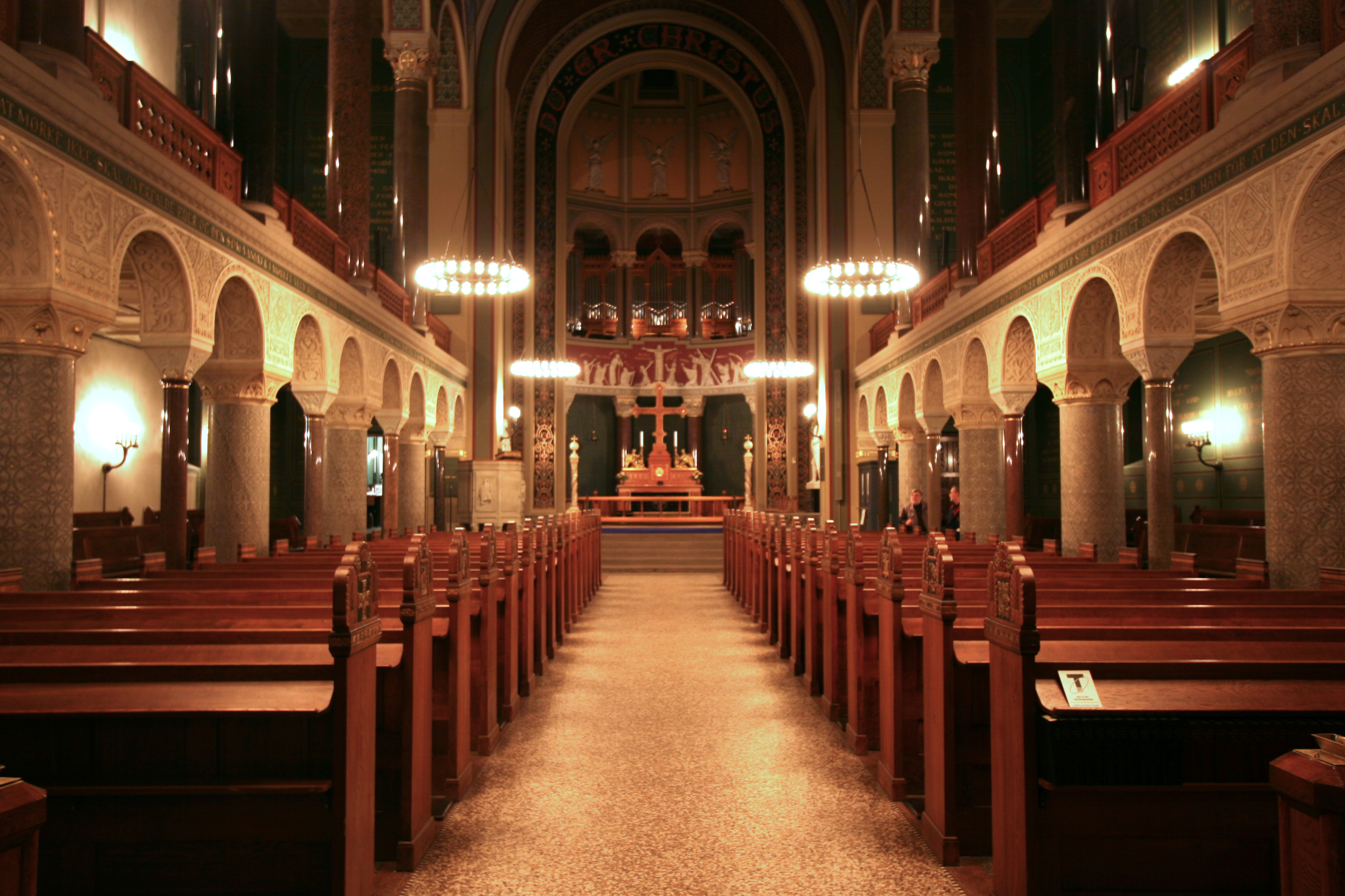 Jesuskirken, Valby, Copenhagen, Denmark Interior.